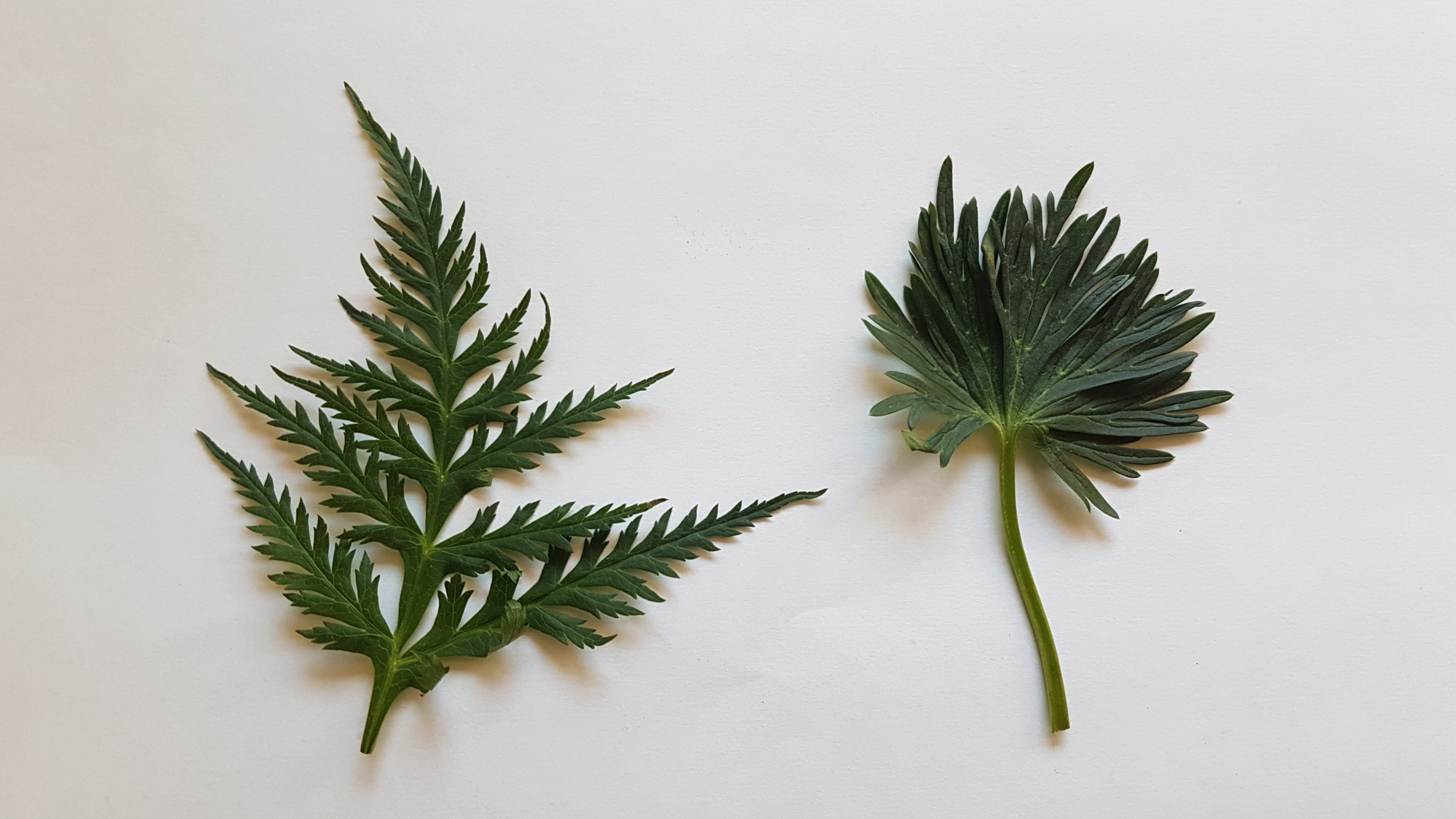 Comparaison des feuilles de Molopospermum peloponnesiacum (à gauche) et Aconitum napellus (à droite), toutes deux prélevées dans la Réserve naturelle nationale de Prats-de-Mollo-la-Preste au mois de juin.